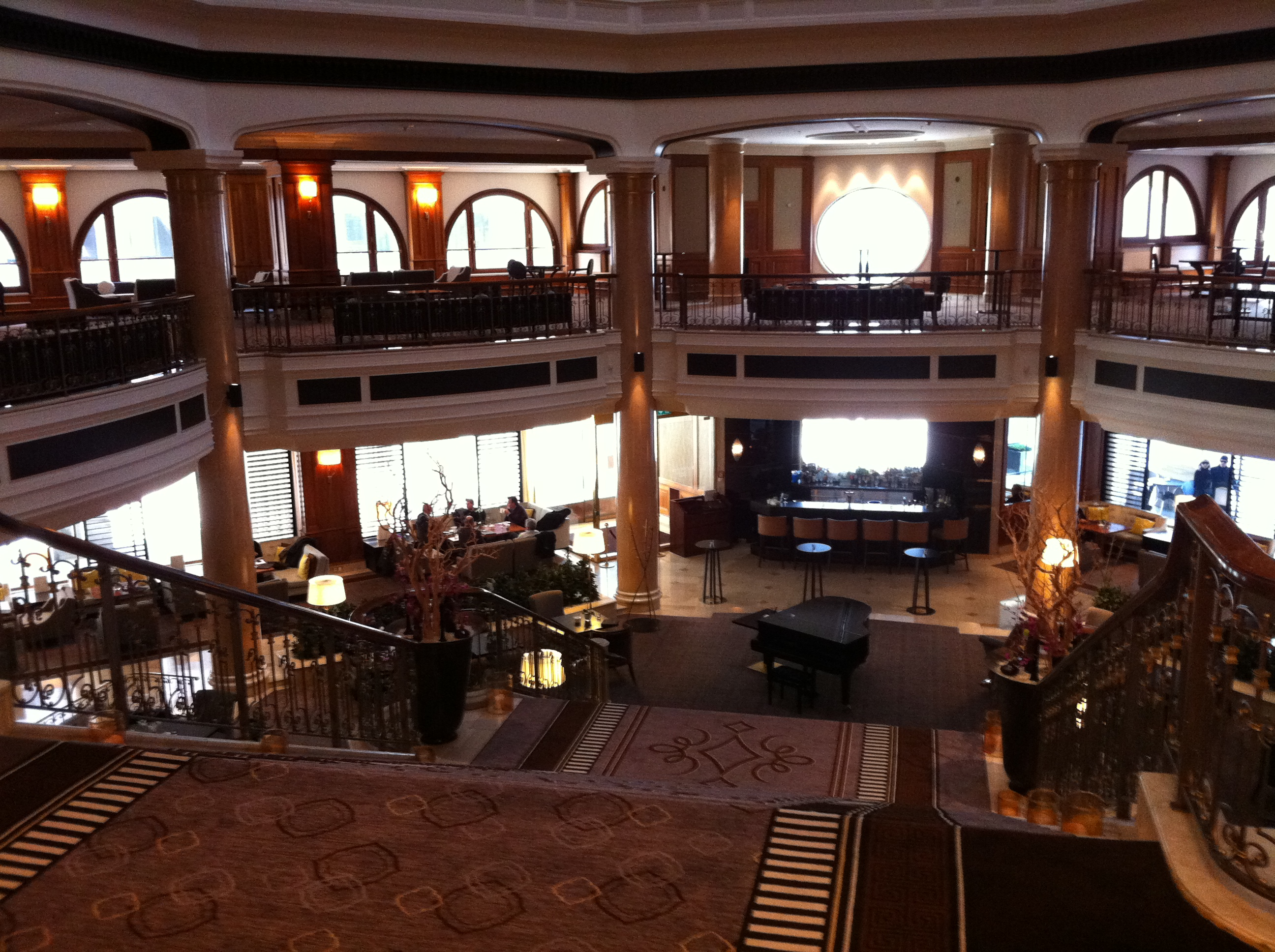 Hotellobby, Treppenaufgang im Berliner Hotel Westin Grand